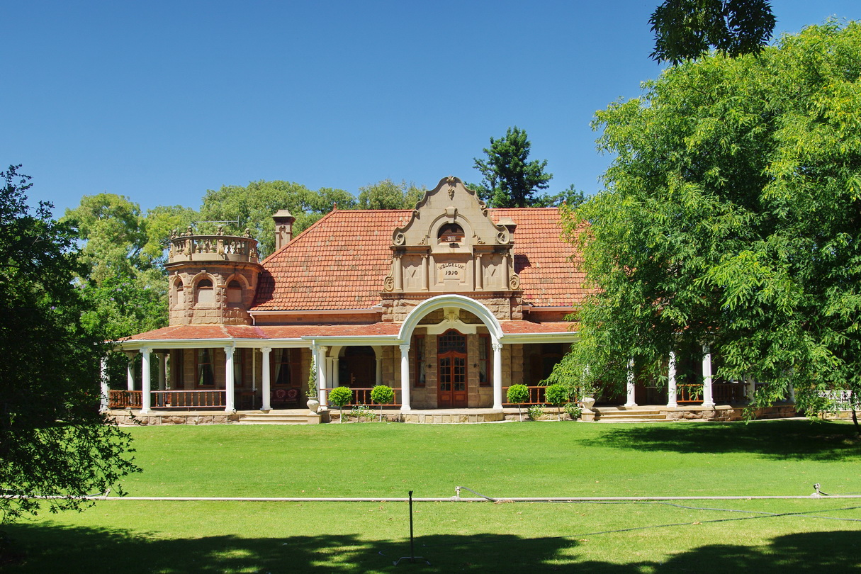 Straußenfarm Oudtshoorn This media shows a South African Protected Site with SAHRA file reference 9/2/068/0008.